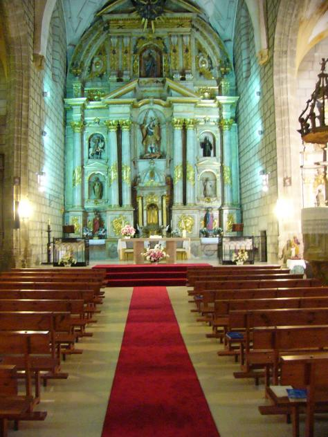 Retablo principal de la Iglesia de San Miguel Arcángel